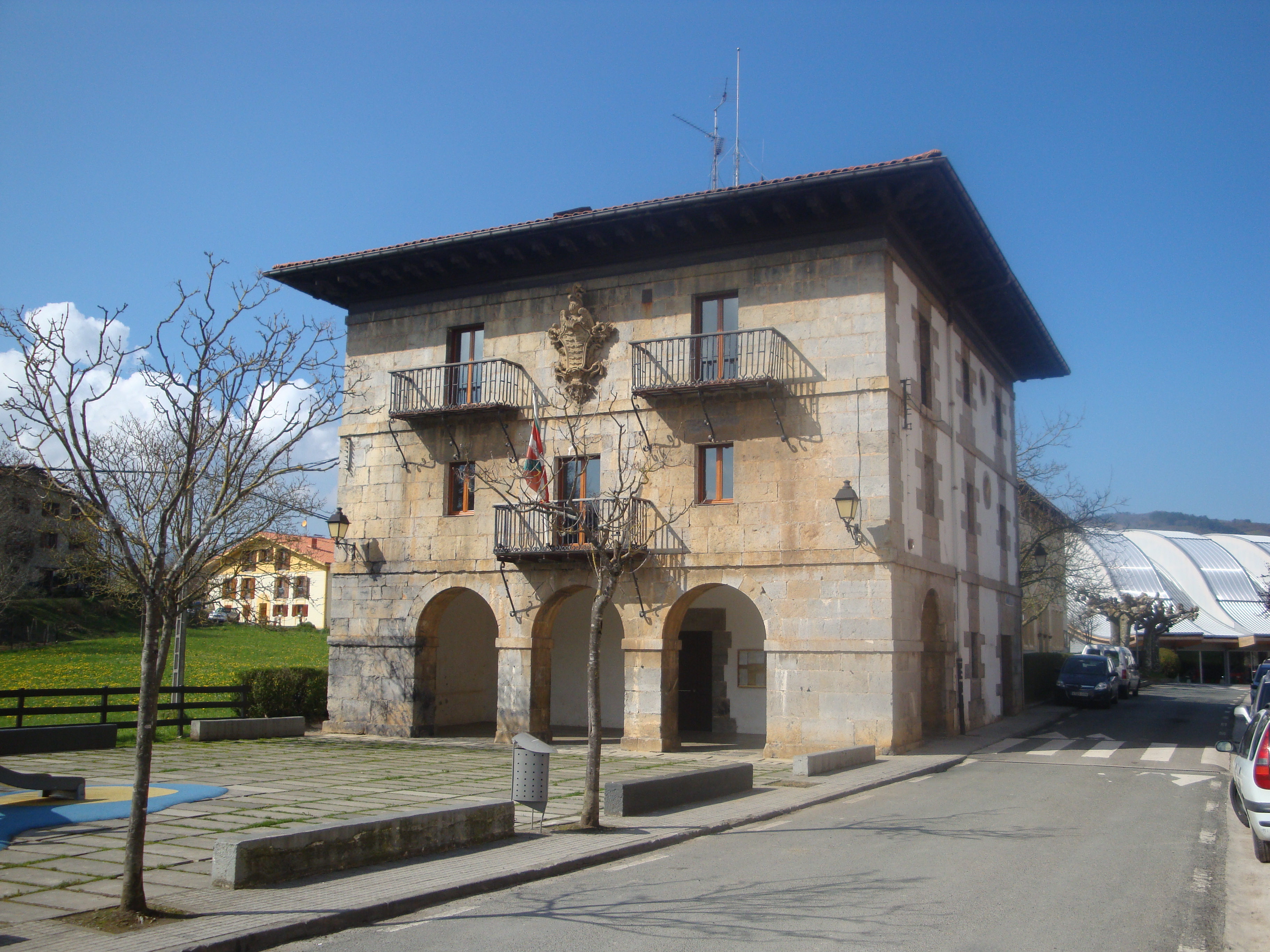 Zizurkilgo Udaletxea, XVIII. mendekoa